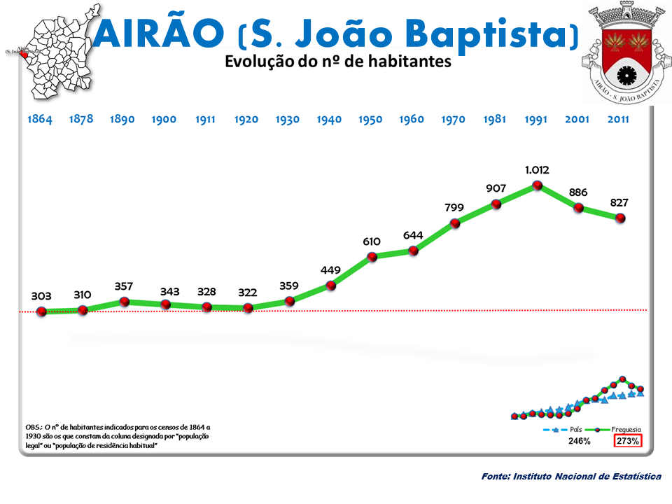 Evolução da População 1864 / 2011